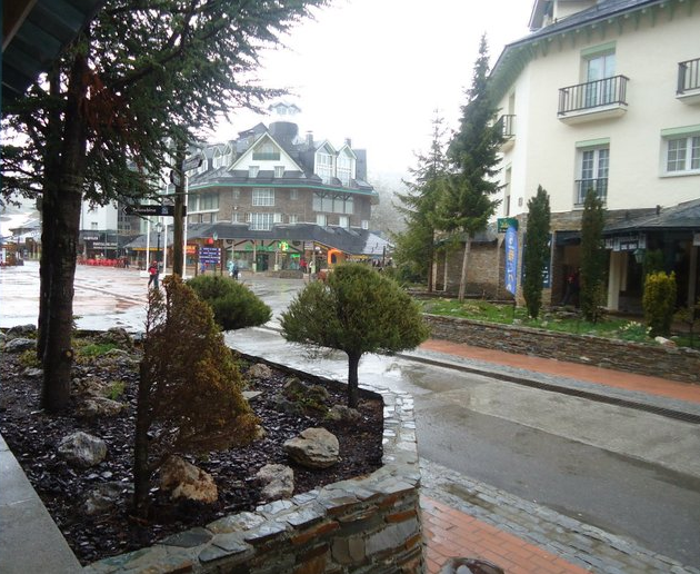 Calle en la Estación de Esquí de Sierra Nevada, dentro de la localidad de Pradollano, municipio de Monachil (Granada, España)